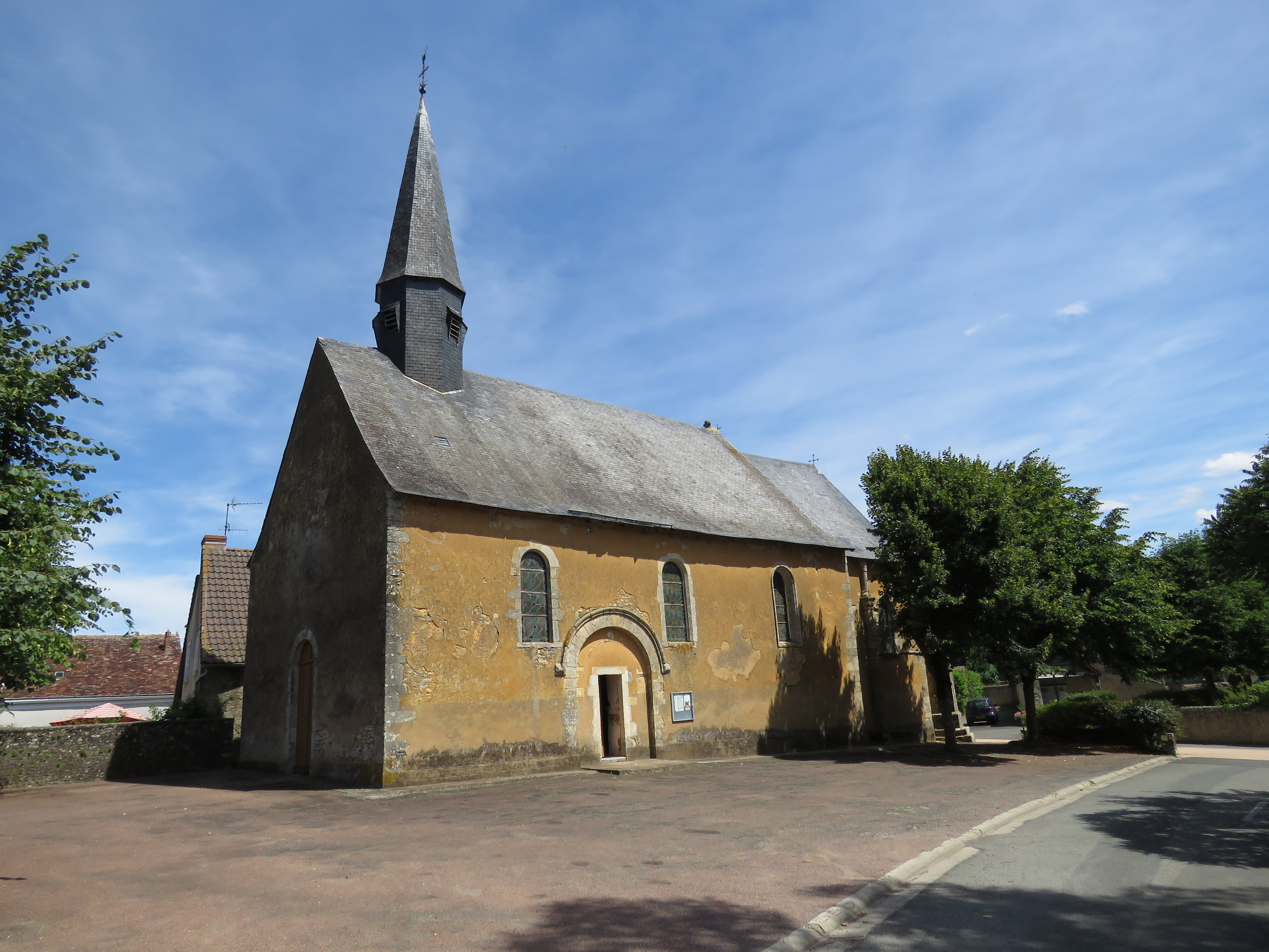 Face sud